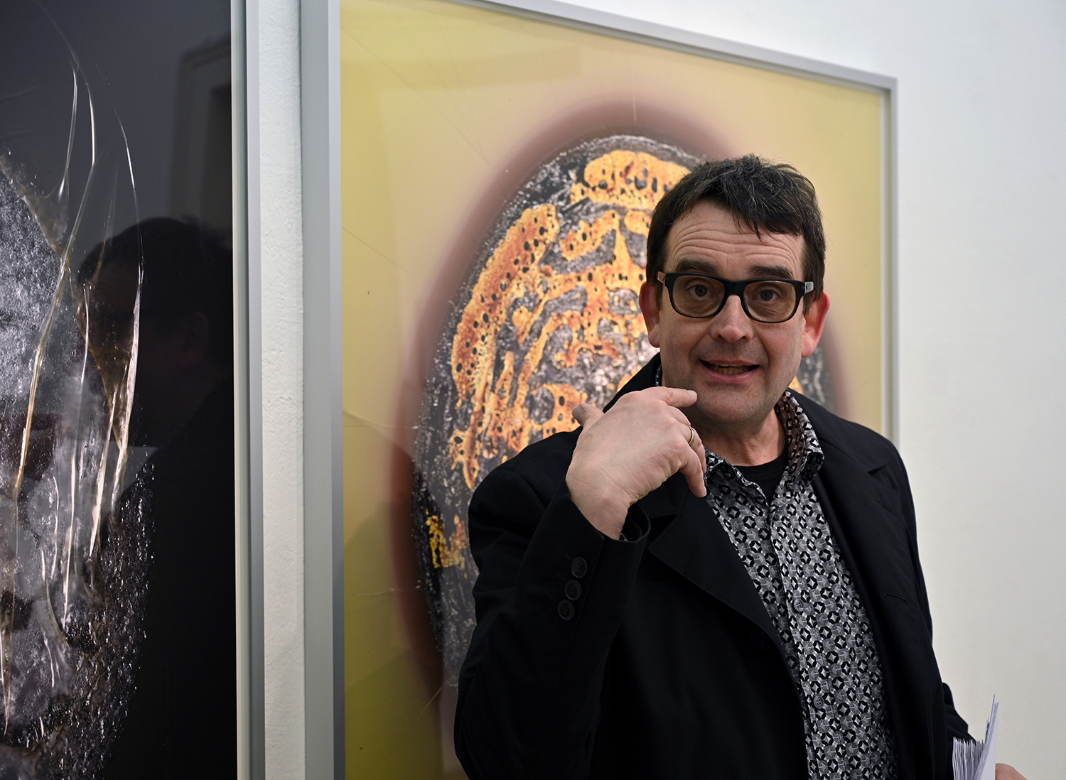 Claus Stolz in der Oberwelt, Stuttgart, 2019 Foto: Karin Heinelt